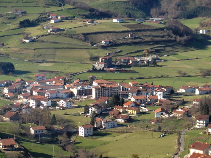 Berastegi Gorosmenditik ikusita